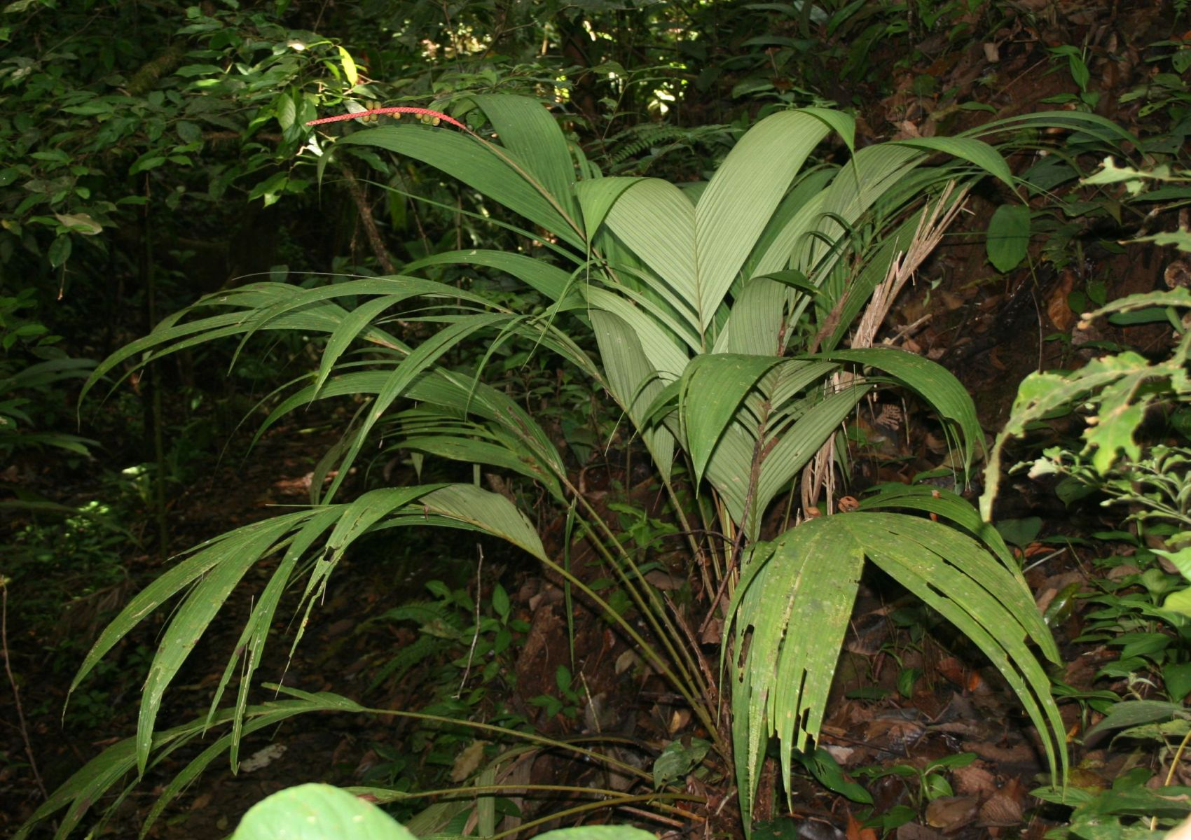 Calyptrogyne ghiesbreghtiana, Palmen (Arecaceae) - Costa Rica: Prov. Puntarenas, La Gamba NW Golfito, "Cataratas Trail" SW "Esquinas Rainforest Lodge"